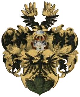 Bergi (Kaarma) suguvõsa aadlivapp